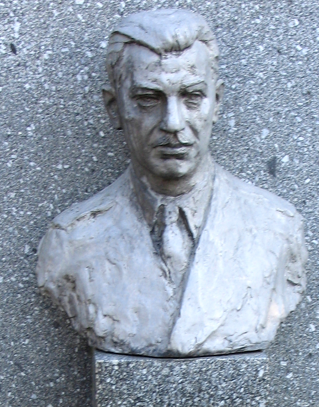 Dukla, Alej hrdinov pplk. Josef Kholl